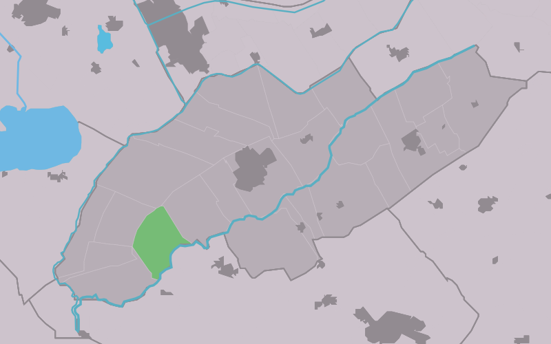 Kaartsje fan himrik fan Nijetrine